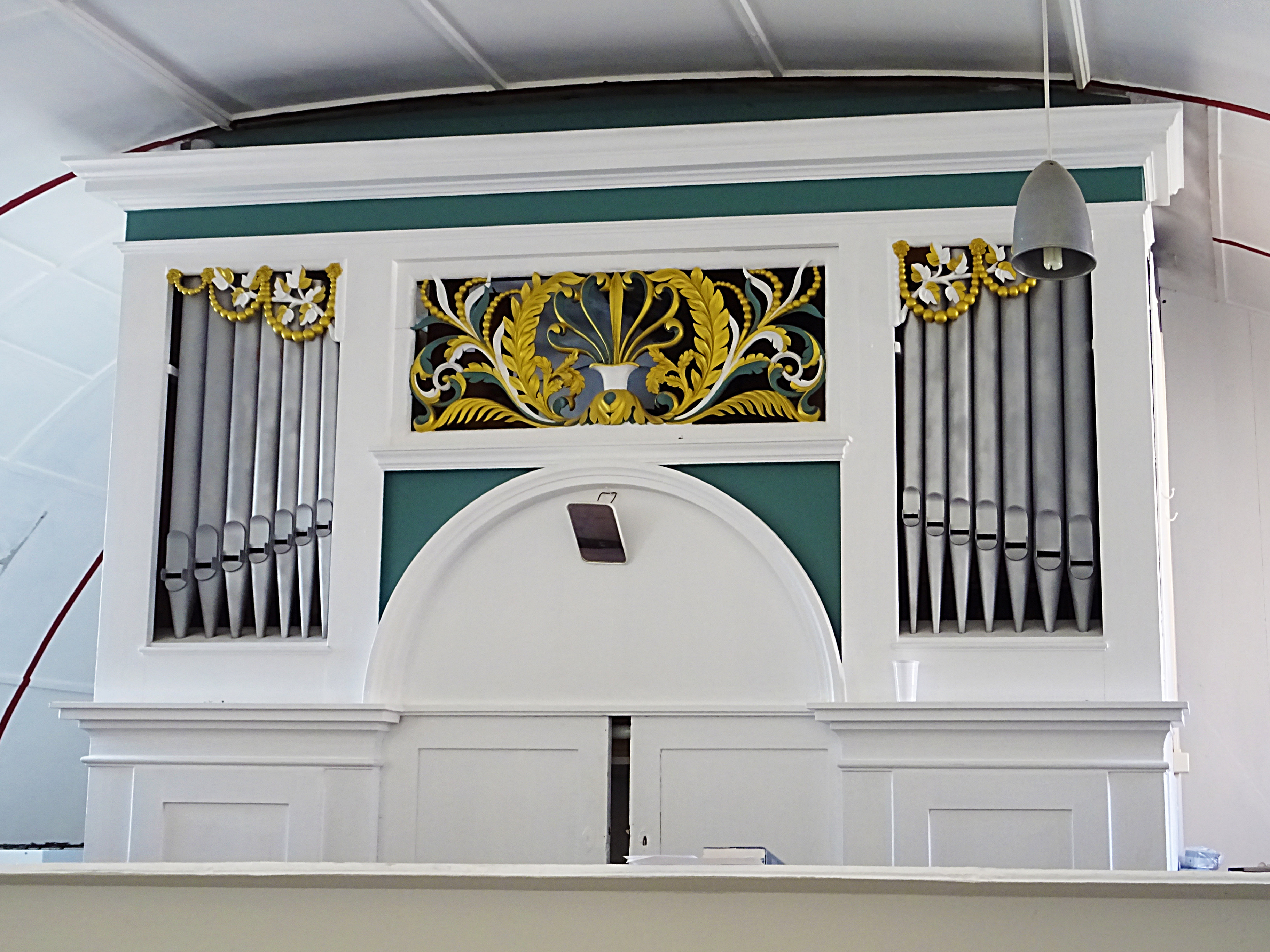 Orgel von Johann Friedrich Schulze aus Paulinzella (1850, I/P8) in der Kirche St. Jakobus (Rottenbach)